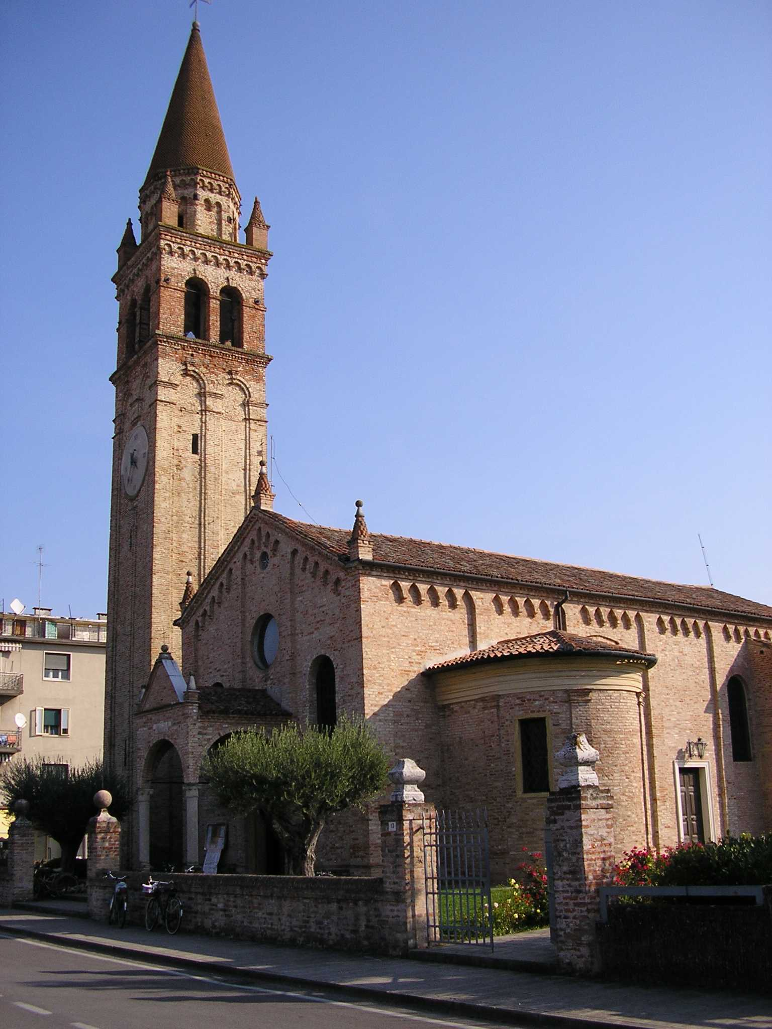 Chiesa di Pianiga (provincia di Venezia)